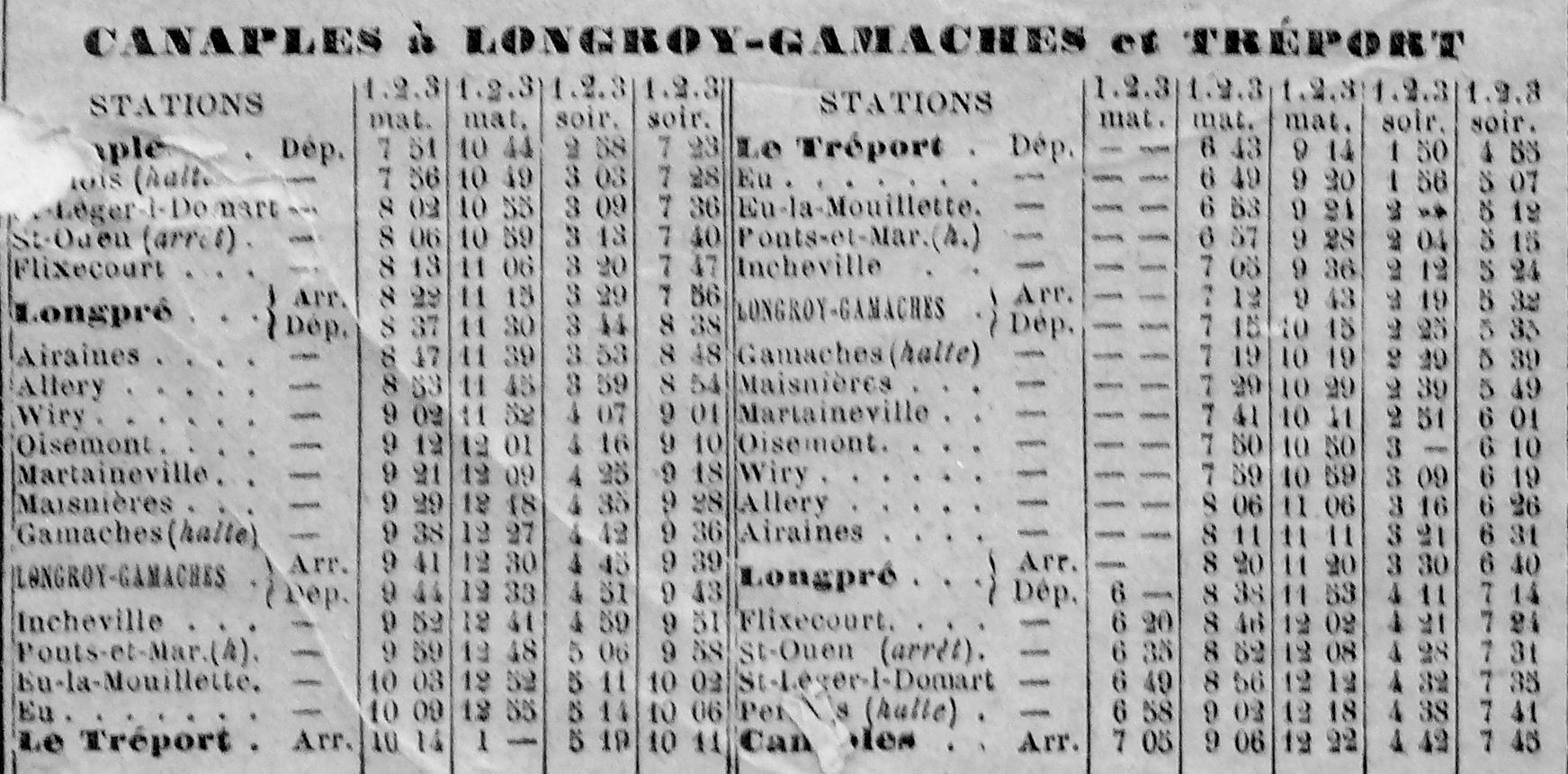 Extrait de l'affiche éditée en supplément du Le Courrier de la Somme : Horaires des trains du service d'hiver (novembre 1890) : Ligne Canaples - Longroy-Gamaches - Le Tréport